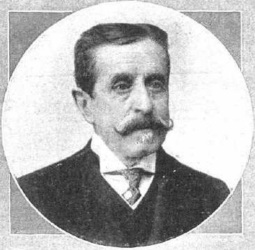 Retrato del militar y dramaturgo español Leopoldo Cano publicado en 1913